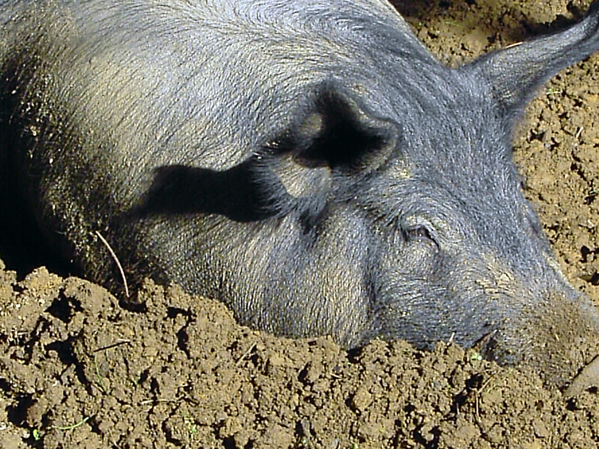 Cerdos de la Sierra de Huelva